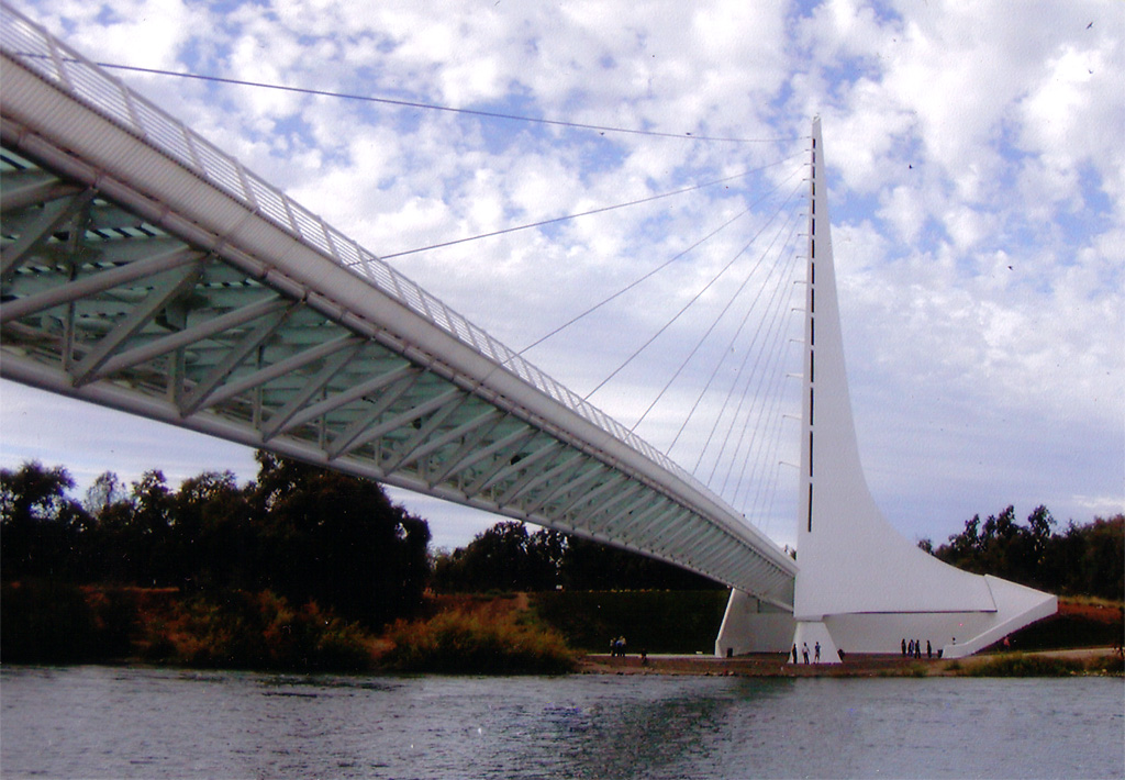 Photo by C. Antkowiac